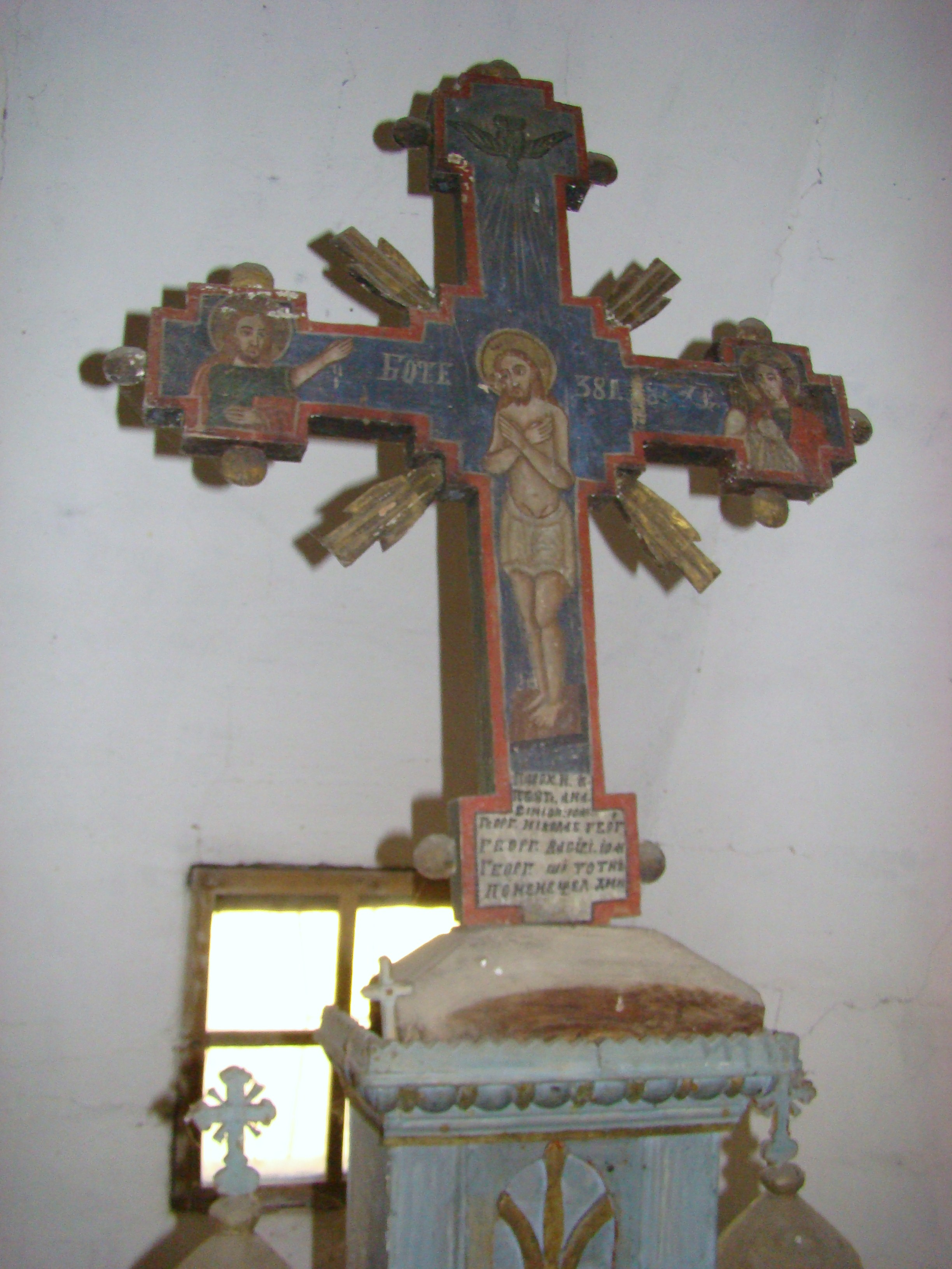 Biserica de lemn „Sfinții Arhangheli” din Săliștea, județul Alba